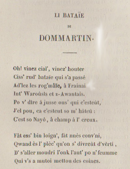 Walon: Paskeye del bataye di Donmårtén (ortografeye da Bailleux et Dejardin, 1844) : 1î boket